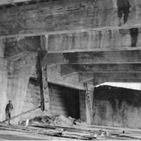 קומת המסד של המרכז המסחרי צפת 1930